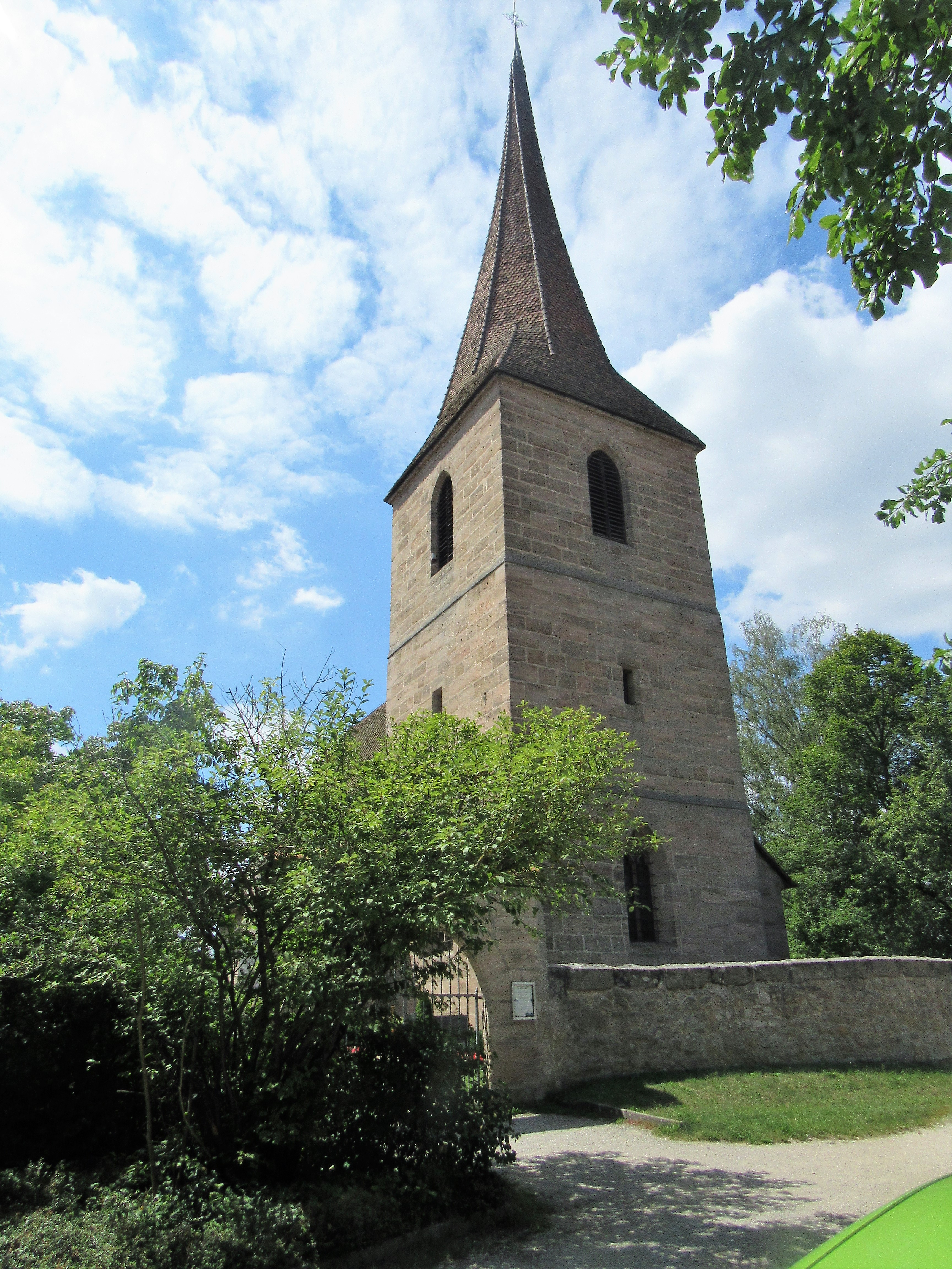 Die Allerheiligenkirche in Kleinschwarzenlohe